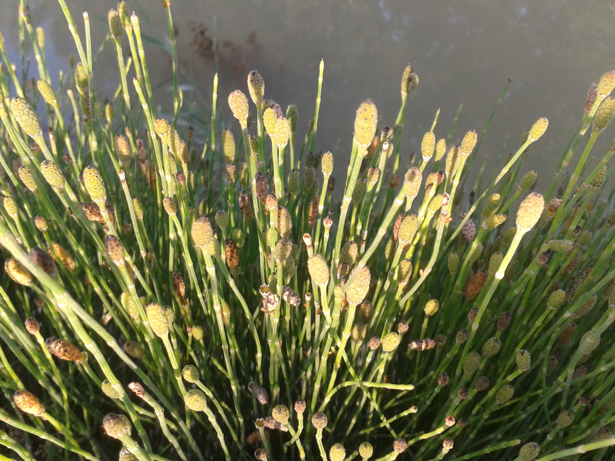 Imagen de varios ejemplares de Equisetum variegatum en donde se ven, en algunos ejemplares, los mucrones; los apéndices que rematan los estróbilos